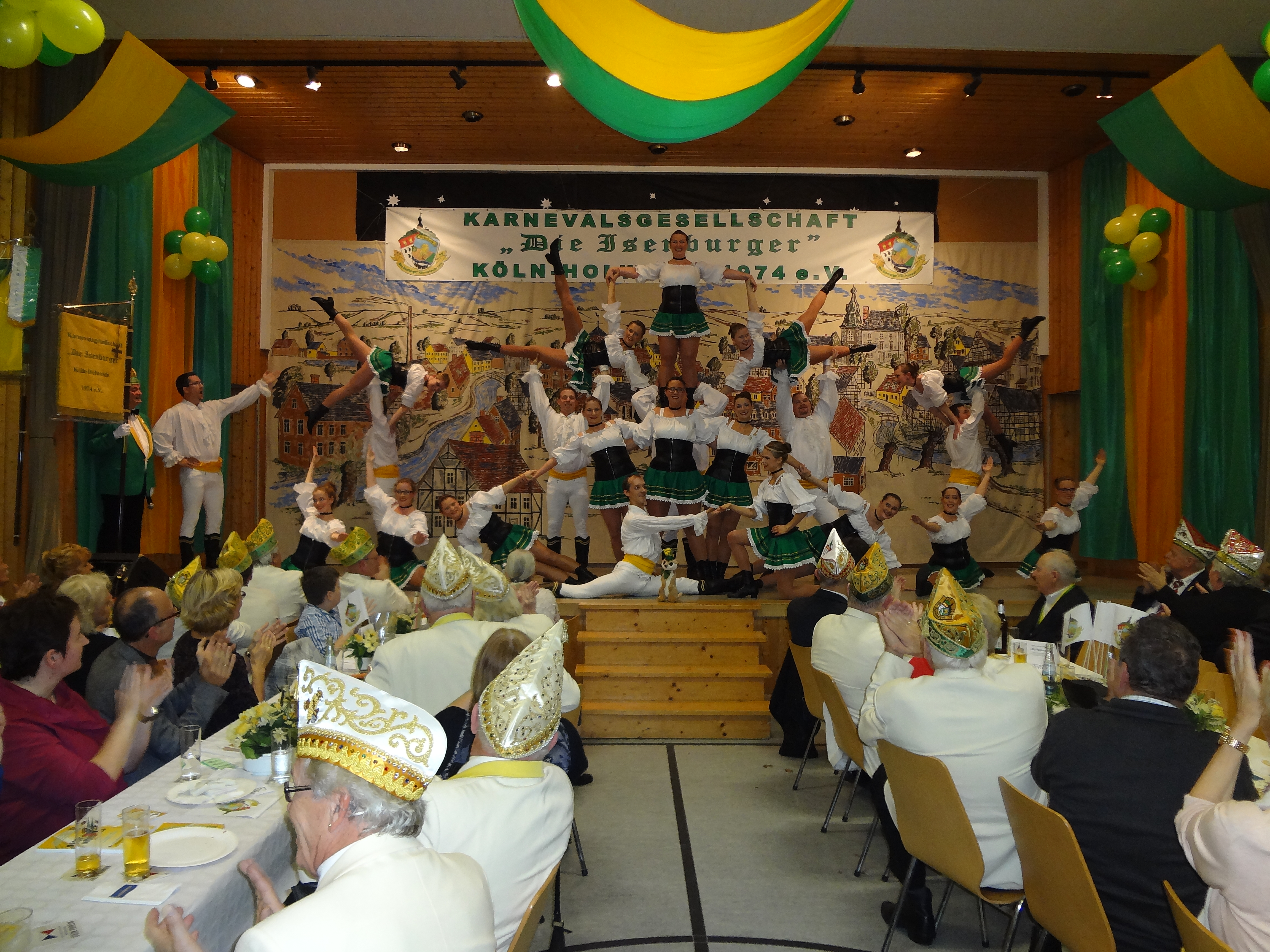 Tanzgruppe beim Auftritt am Ordensabend 2015